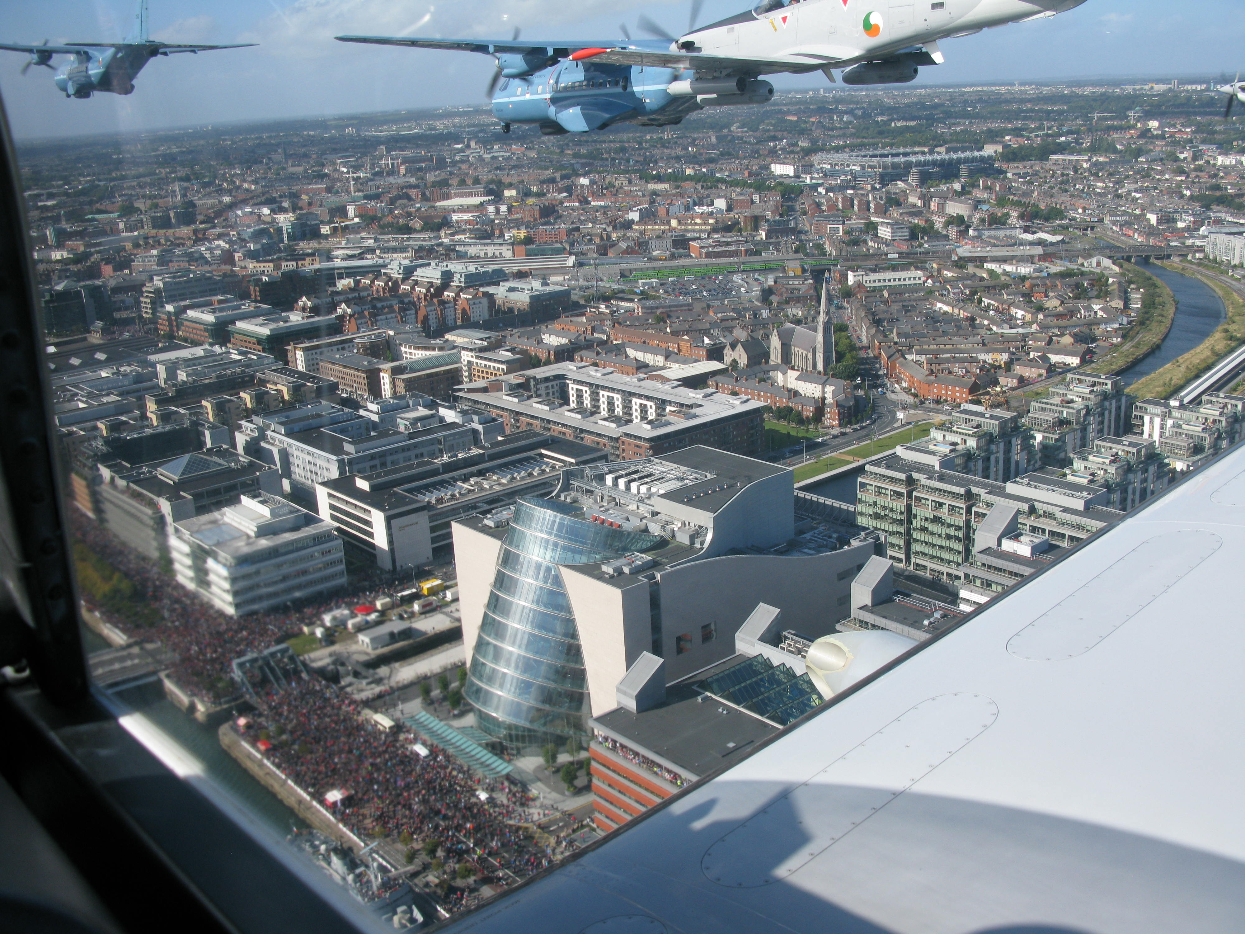 Flight Fest 5